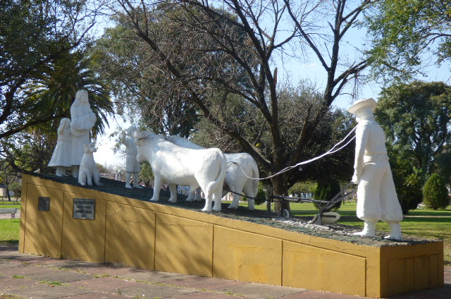 Monumento a los Colonizadores. Representa el trabajo de los inmigrantes que llegaron de distintos países a poblar la localidad.